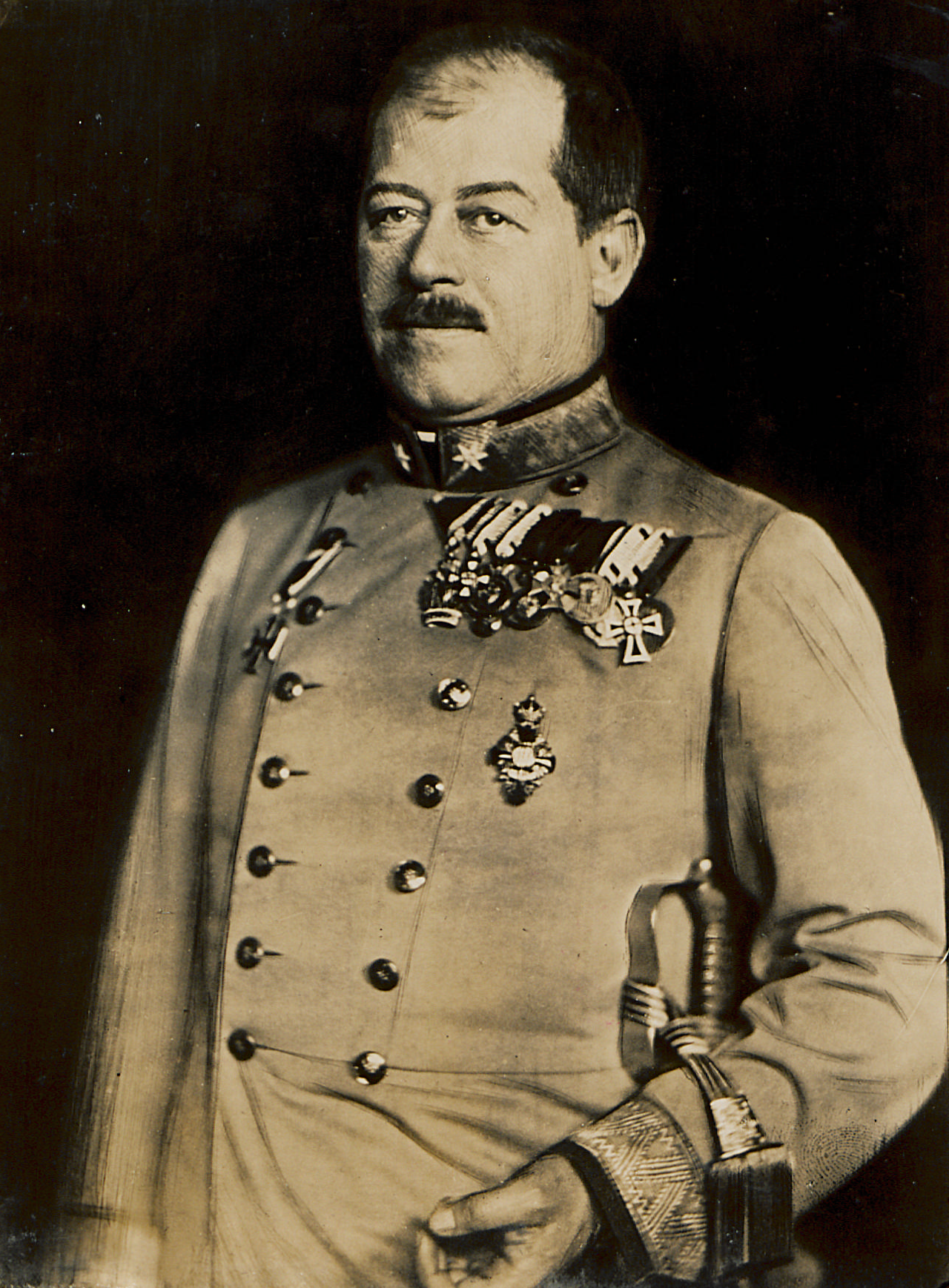 Generalmajor Ritter von Hoen, dem Kommandanten des österr.-ung. Kriegspressequartiers ist in Anerkennung vorzüglich. Dienstleistungen vor dem Feind das Ritter-Kreuz des Leopoldordens mit der Kriegsdekoration verliehen worden